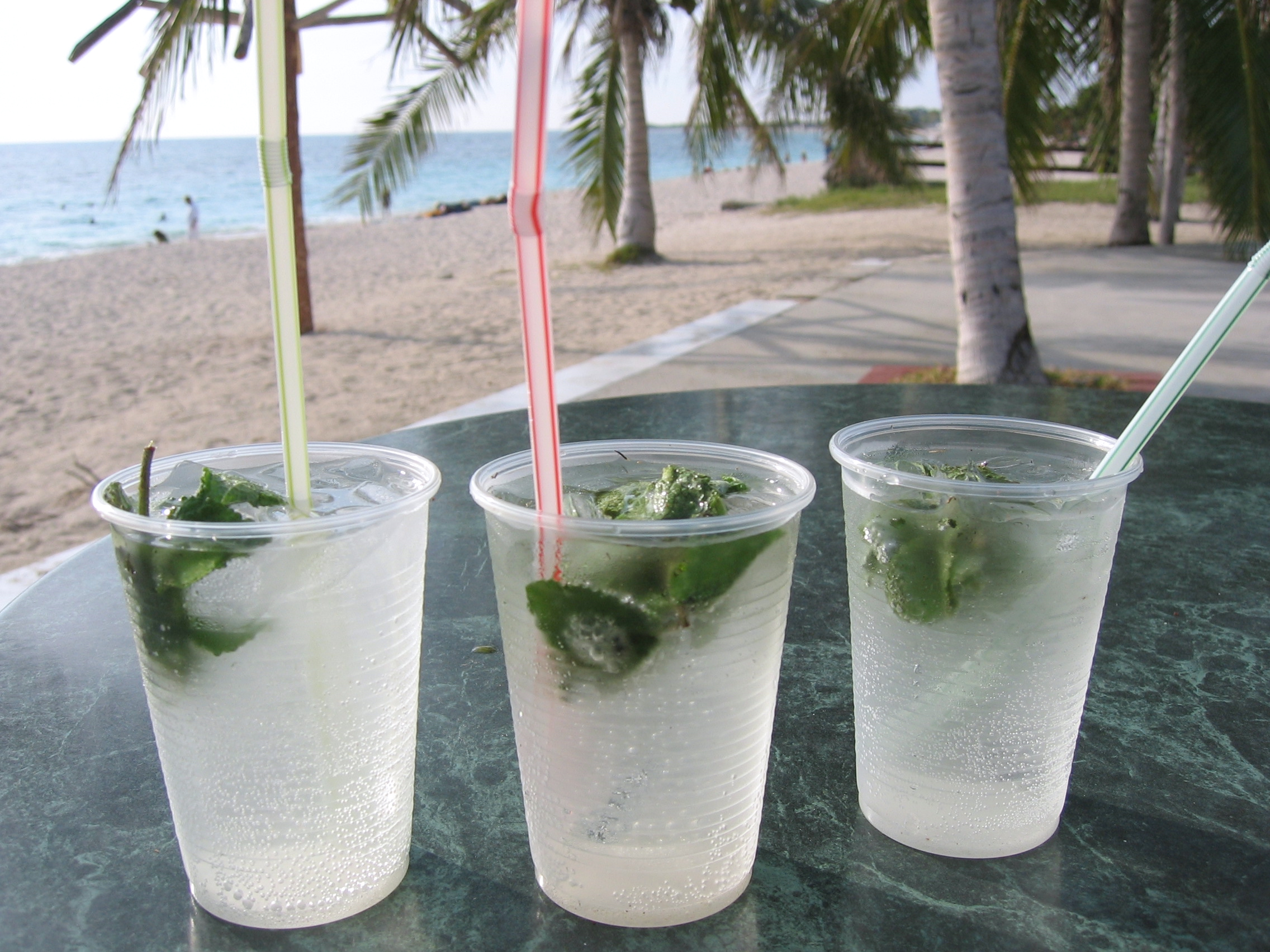 Mojito